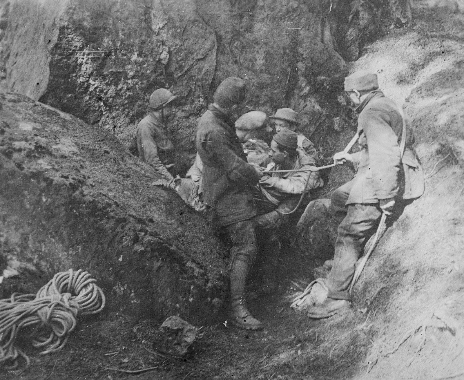 Original image description from the Deutsche Fotothek Höhlenübung